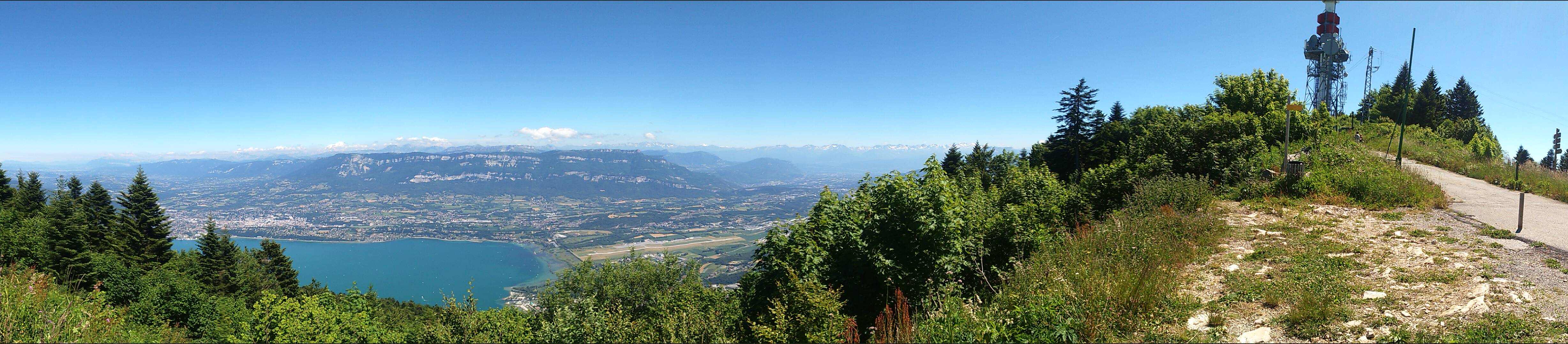 Lieu : relais du Mont du Chat. Vue sur le lac du Bourget, Aix-les-Bains, les Bauges et le signal du Mont du Chat à droite.